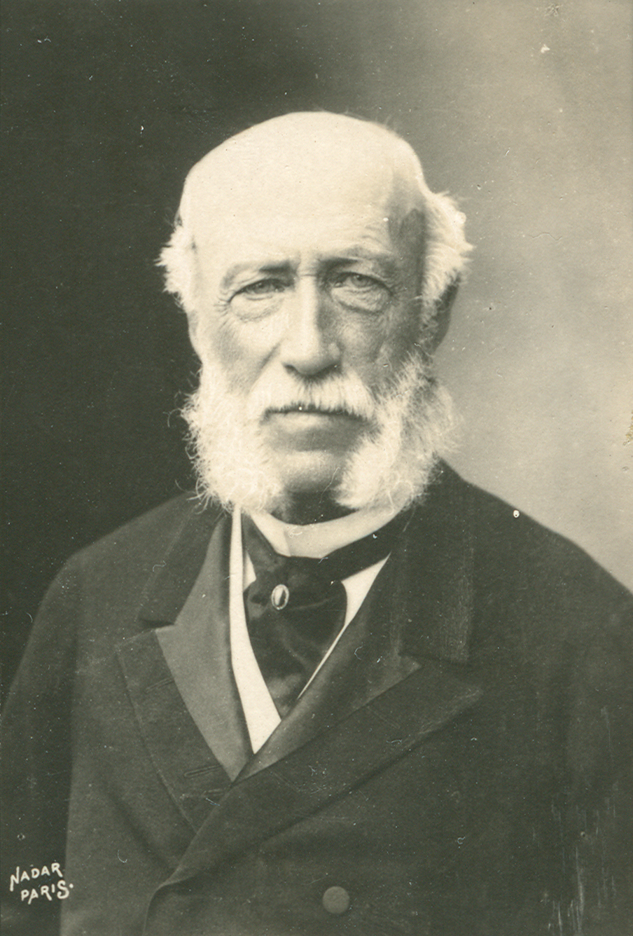 Georg Herbert Fürst Münster von Derneburg, hier noch als Graf (frz.: Comte) bezeichnet, fotografiert von Nadar. Das Sammelbild aus der Félix Potin war wohl in das gleichnamige Album eingeklebt (siehe unten, Rückseite).